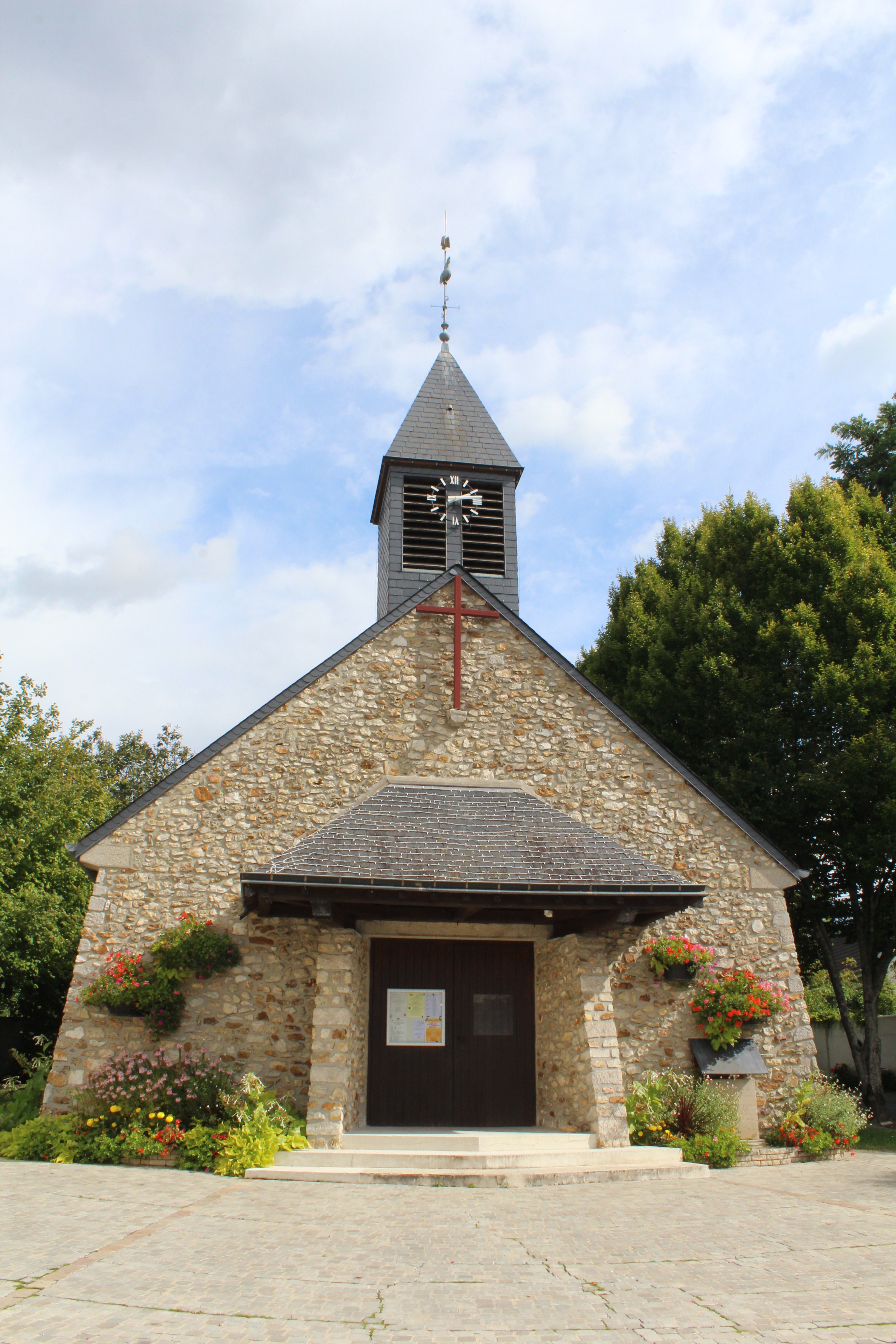 Église Saint-Marcel de Croissy-Beaubourg.